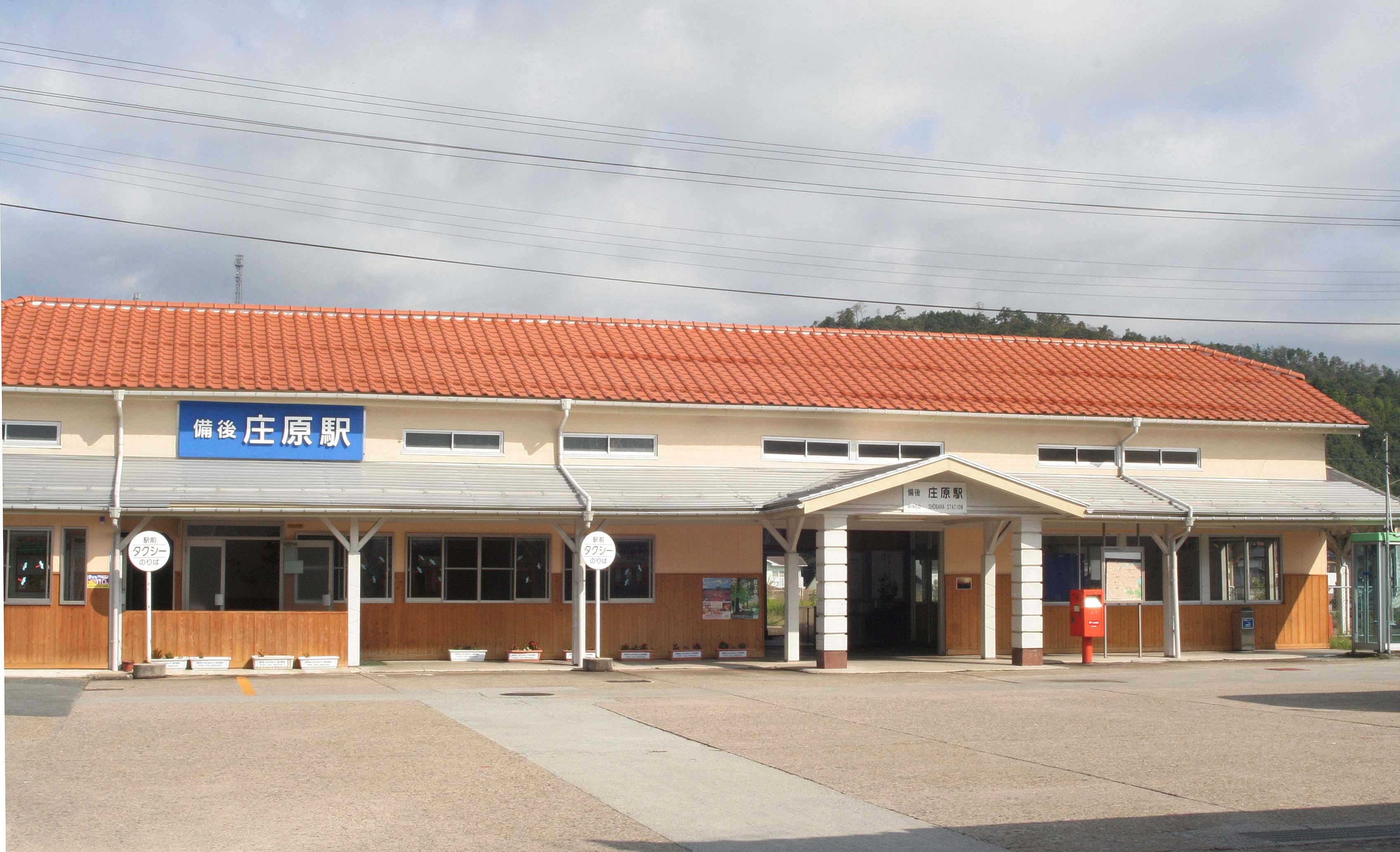 西日本旅客鉄道 備後庄原駅の駅舎